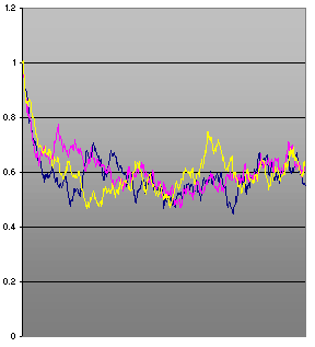 Pfade eines CIR-Prozesses.